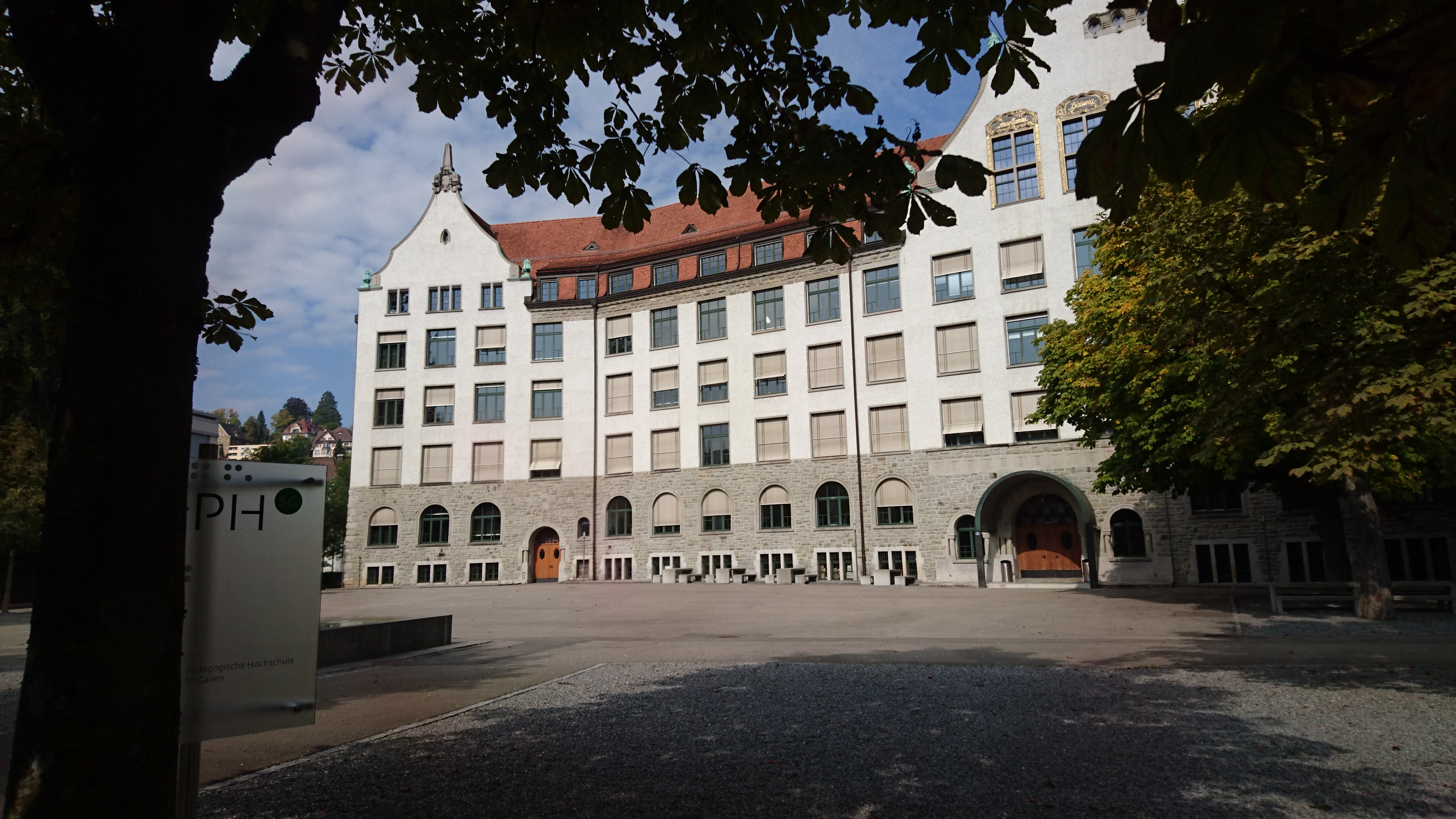 Südfront der Pädagogischen Hochschule St. Gallen